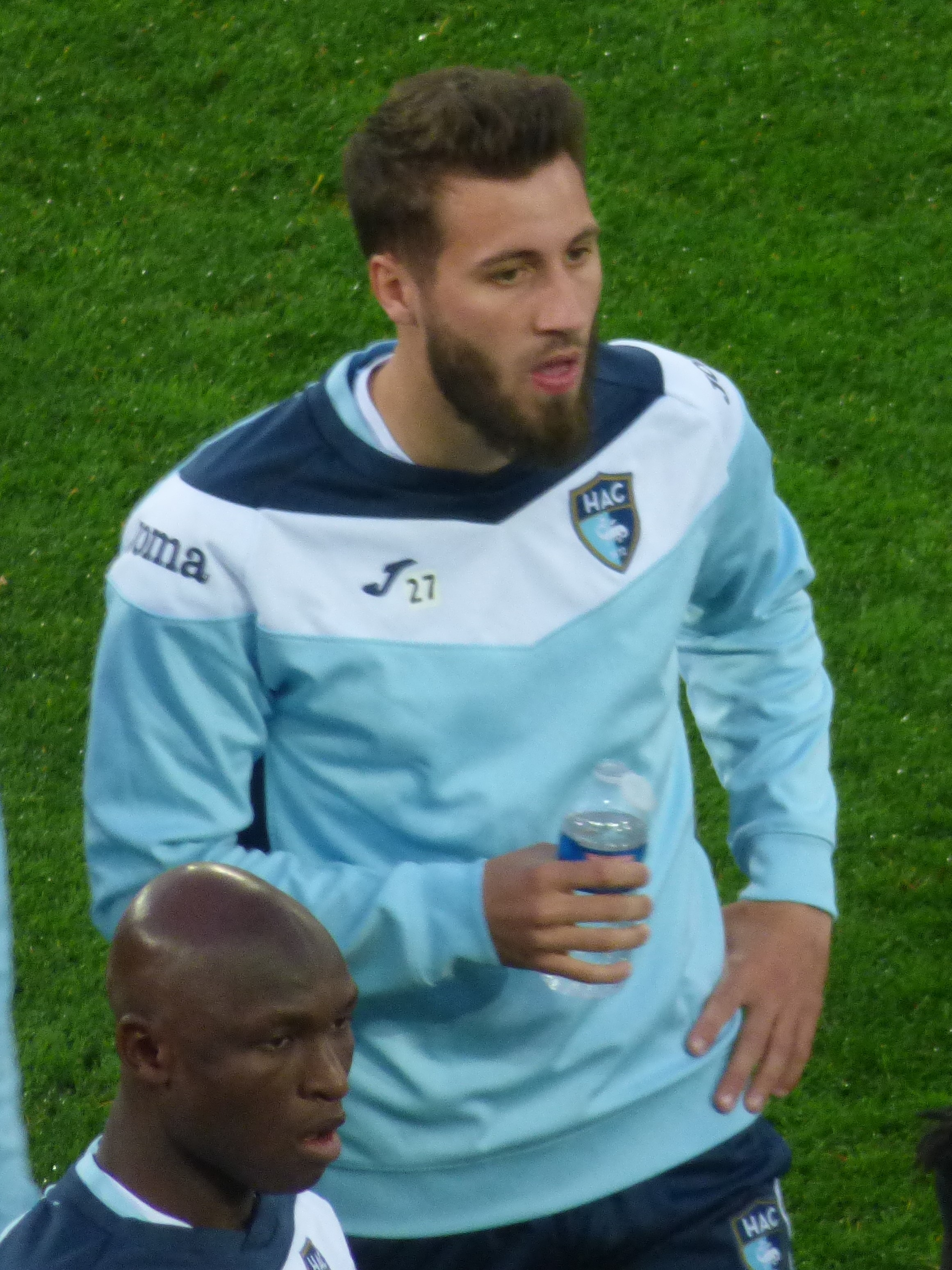 Romain Basque avant le match Lens / Le Havre, comptant pour la 30ème journée du championnat de France de Ligue 2 2018-2019, le 1er avril 2019 au Stade Bollaert-Delelis.